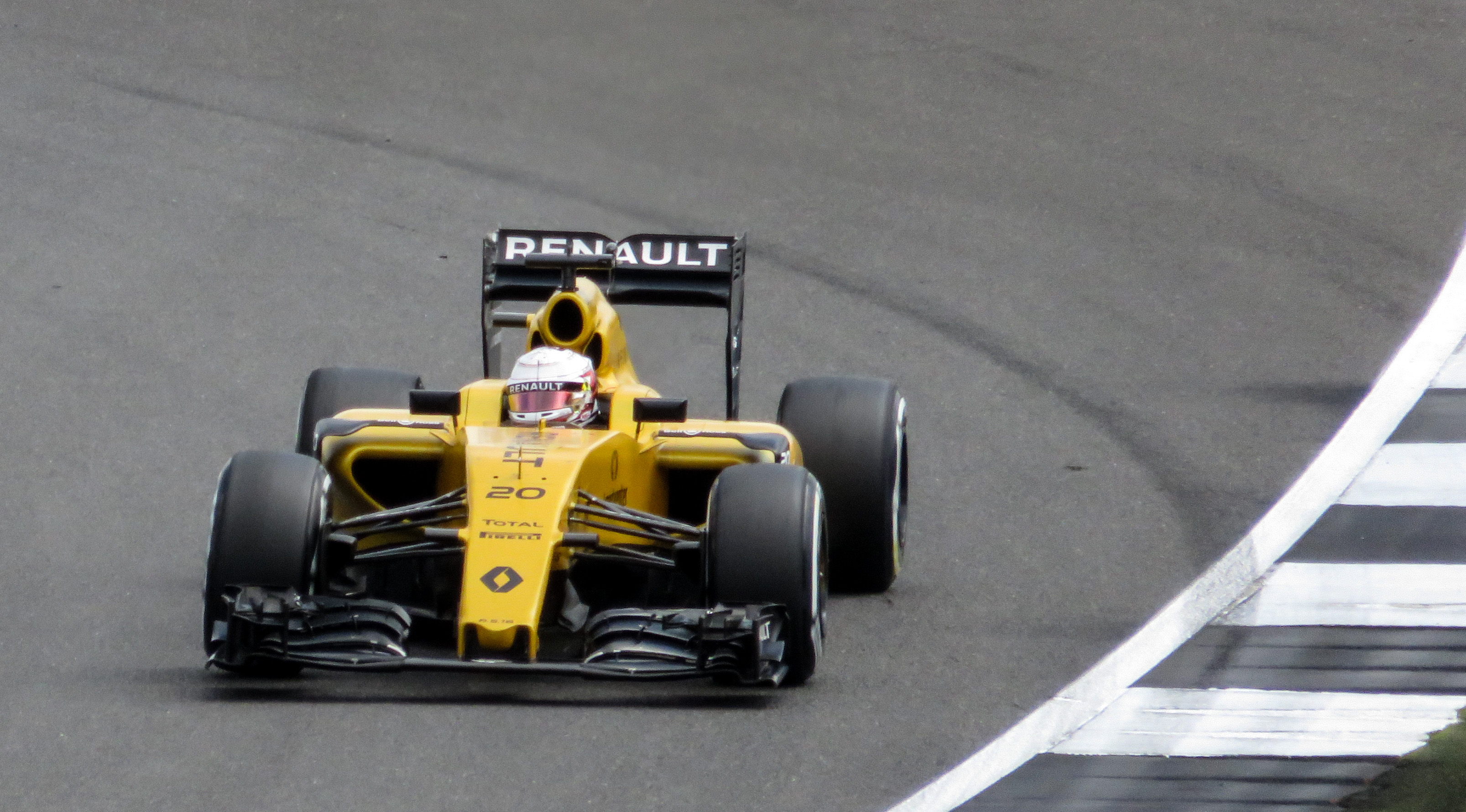 F1 - Renault - Kevin Magnussen